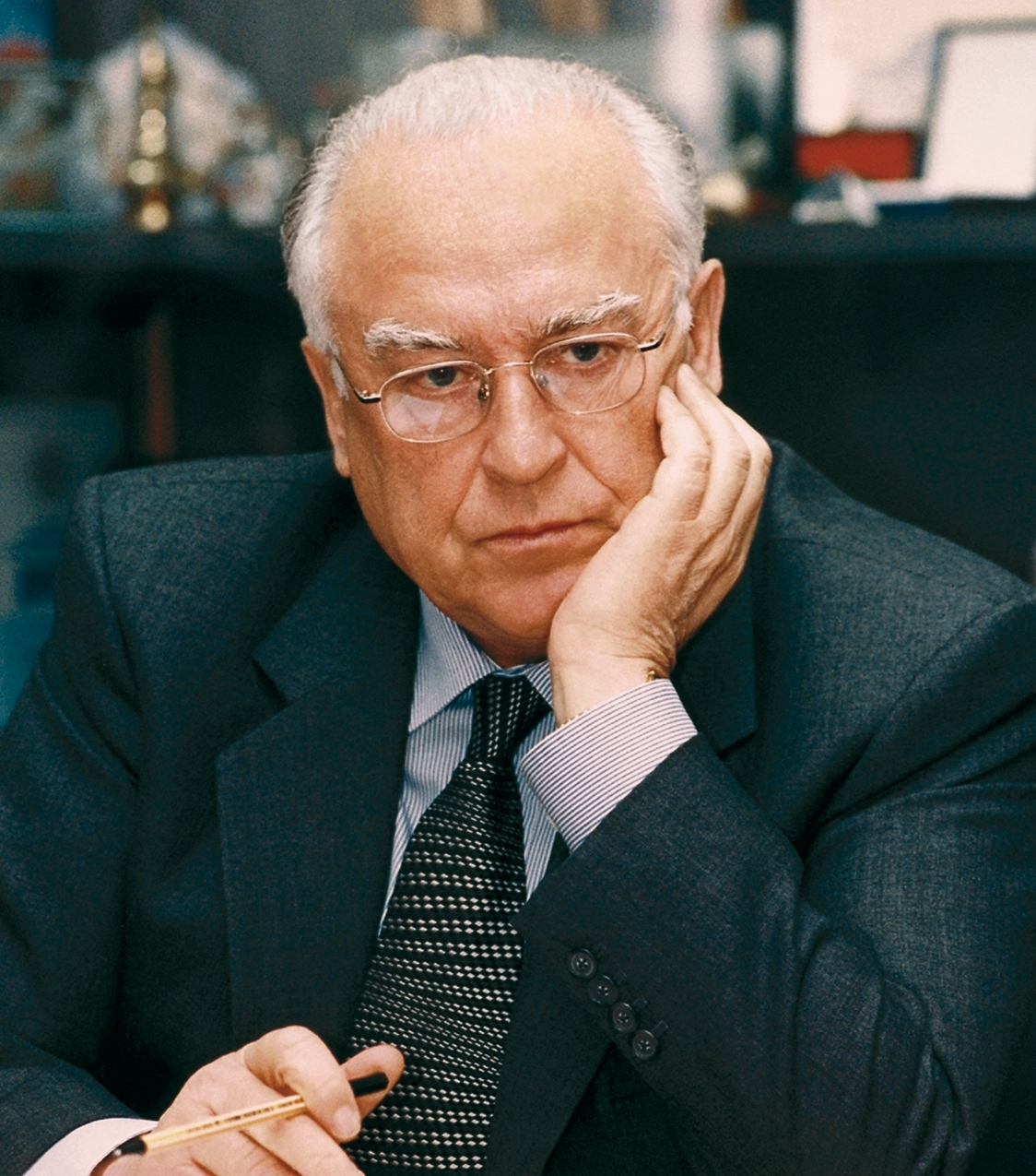 2003 г. ЧЕРНОМЫРДИН Виктор Степанович